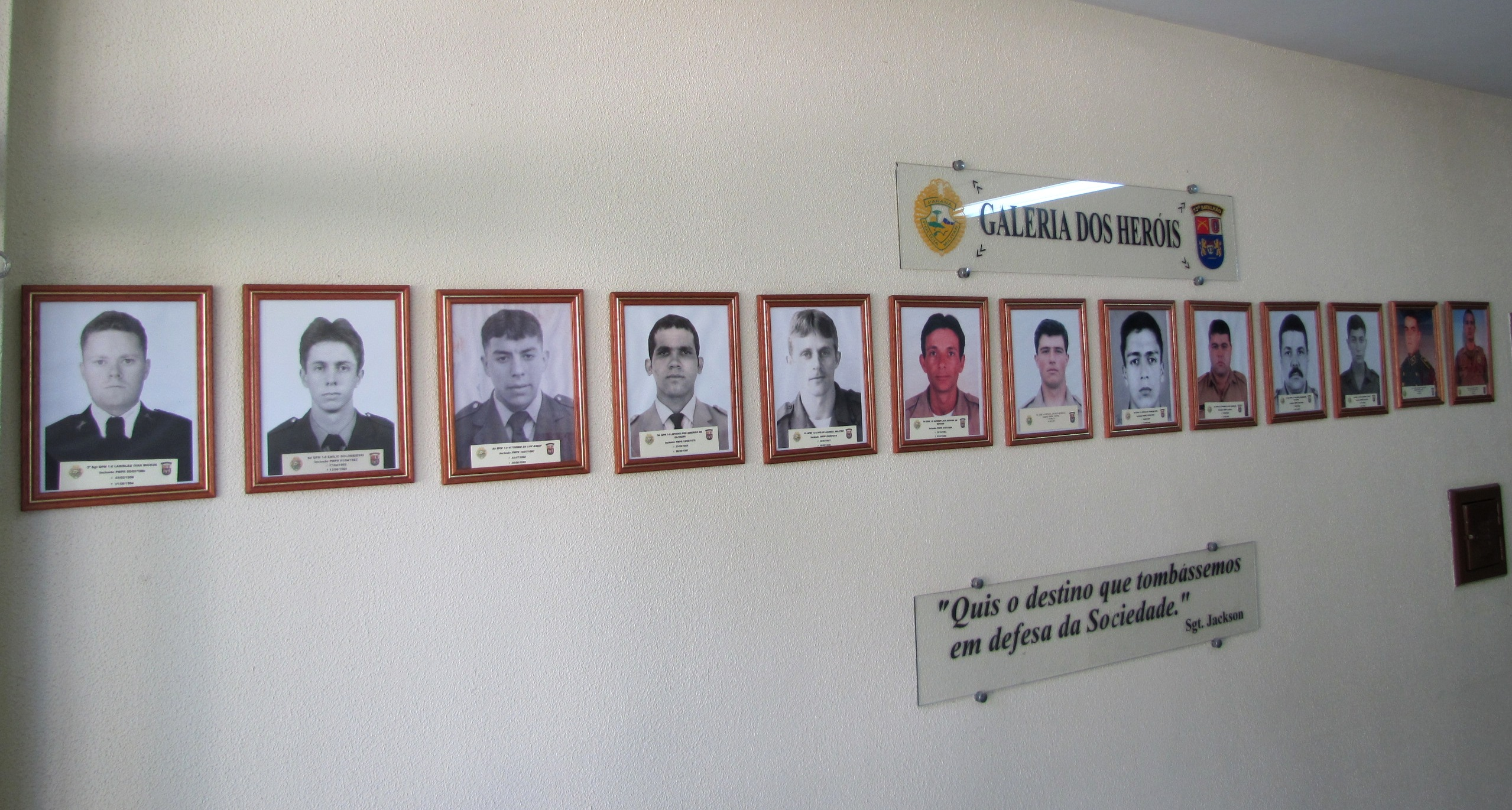 Galeria de heróis do 13º Batalhão da Polícia Militar do Paraná.